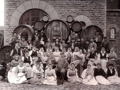 Neumüllers bryggeri vid Åsögatan på Södermalm i Stockholm, personalen 1888